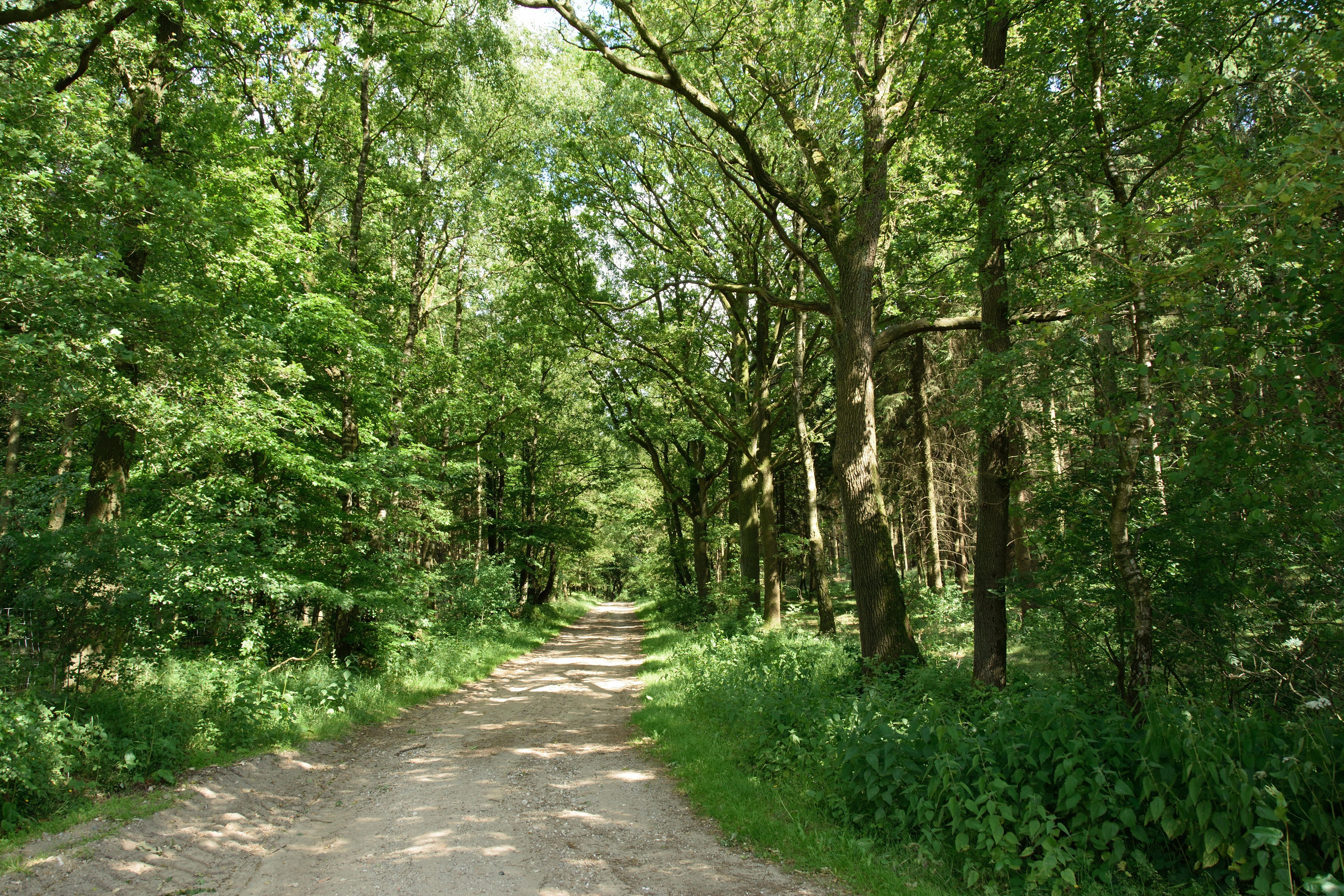 Der Kreis Steinburg hat mehrere Flächen unter dem gemeinsamen Namen "Landschaftsbestandteile und Landschaftsteile im Bereich mehrerer Gemeinden" zusammengefasst. Dieses Foto wurde in der Waldfläche „Glasberg“ in Sarlhusen aufgenommen, es ist das Teilstück Nr. 16.